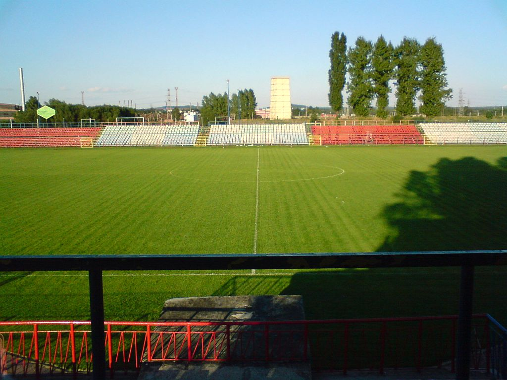 Stadion RKS Raków widok na trybune wschodnią